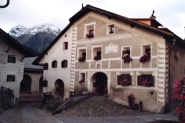 Engadinerhaus in Guarda